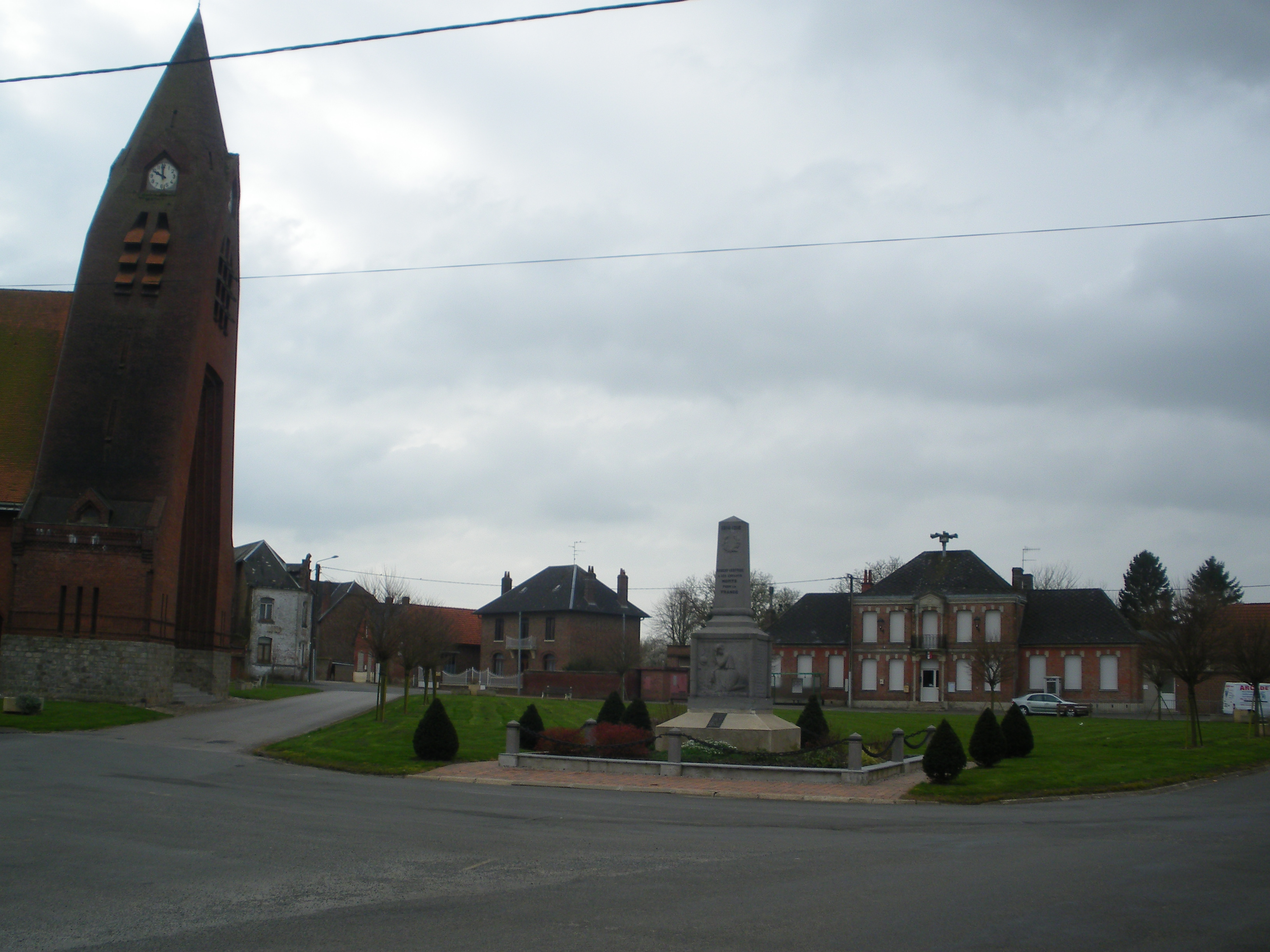 Vue de la place principale de Sauchy-Lestrée. De gauche à droite, l'église, le monument aux morts, la mairie.